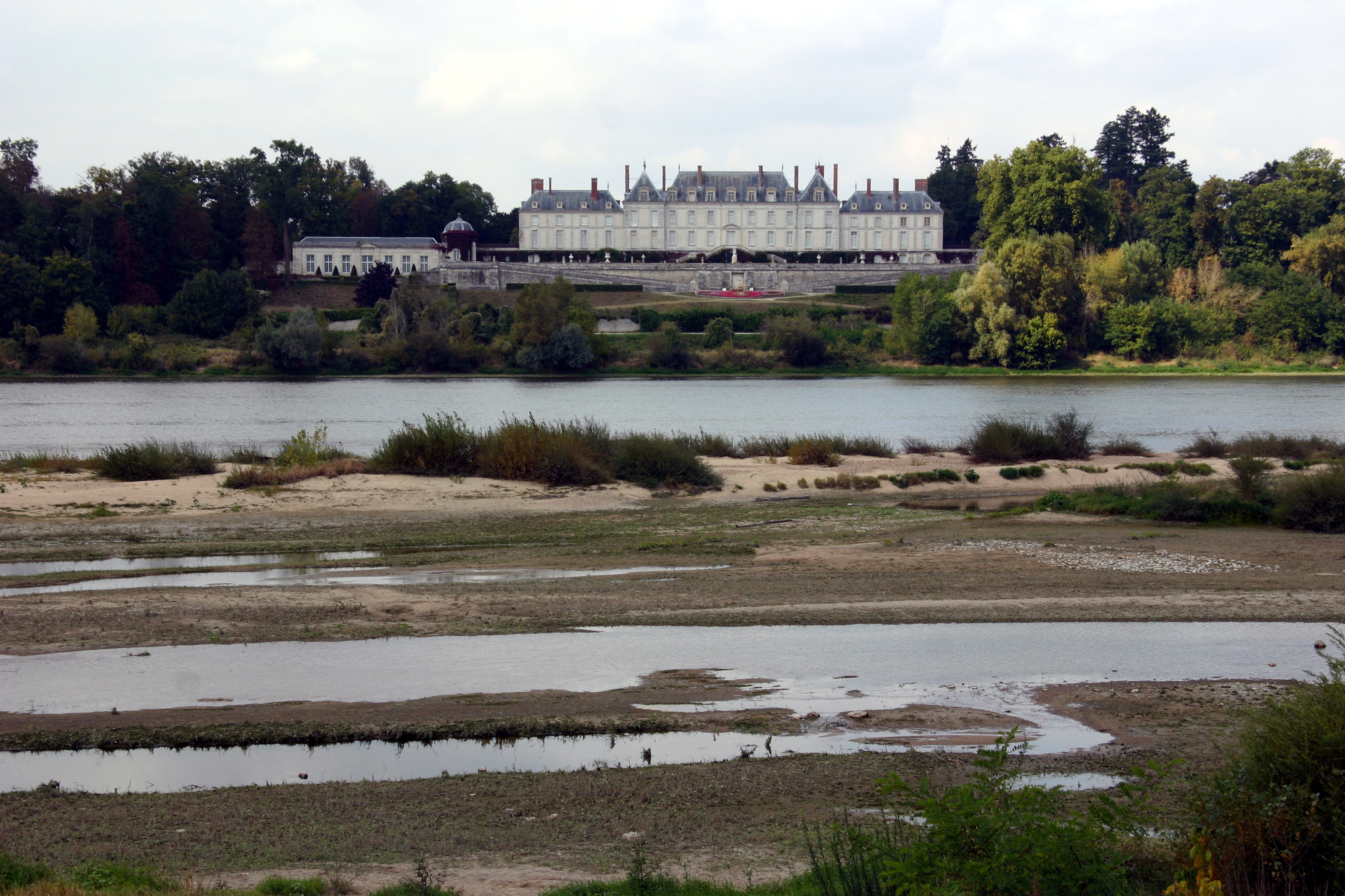 Château de Menars